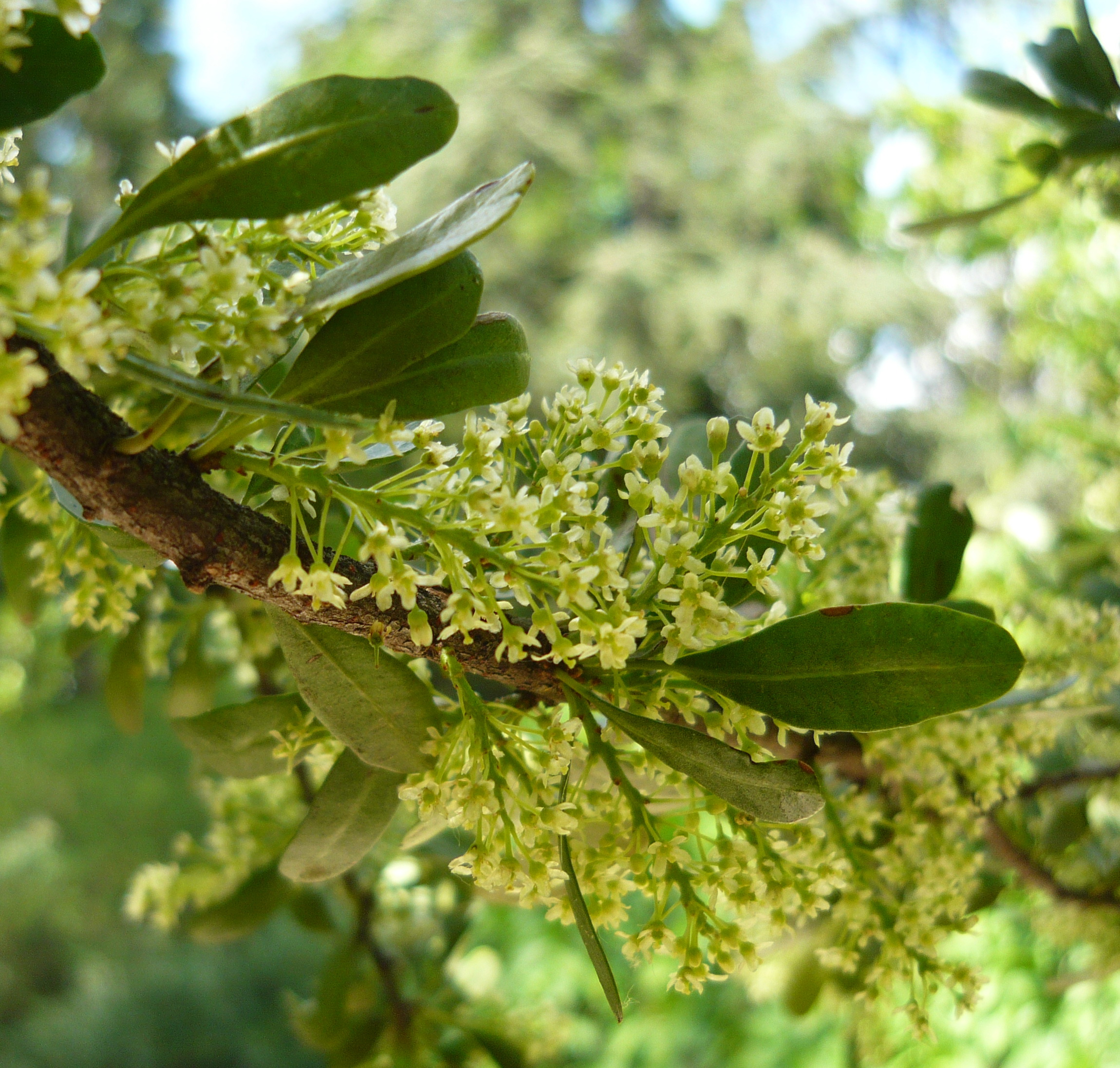 Schinus polygamus. Real Jardín Botánico de Madrid.